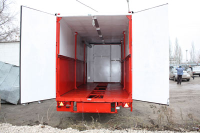 Прицеп трансформер с виду как обычный прицеп, транспортируется именно в таком виде